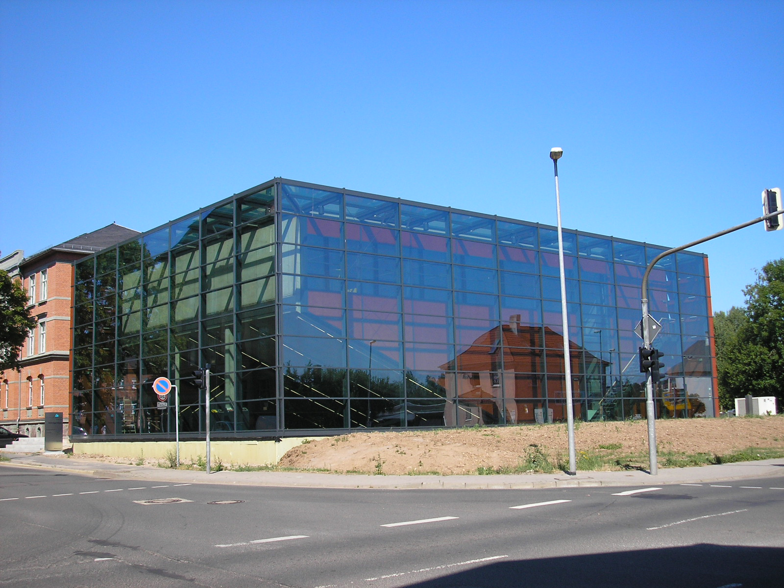 Der Röntgenbau der TU Ilmenau (Thüringen). Erbaut 2005-2006.